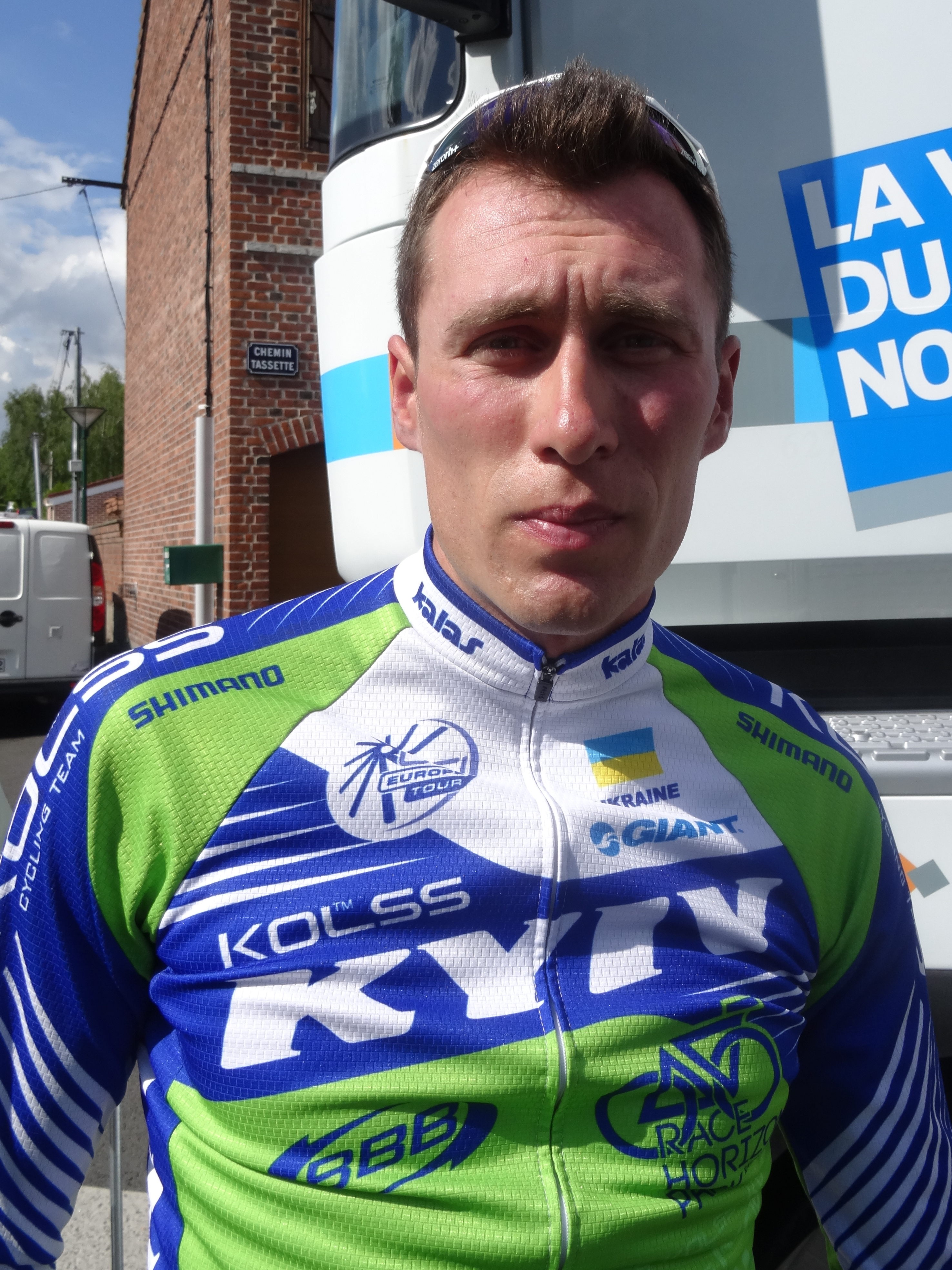 Reportage photographique réalisé le vendredi 23 mai 2014 à l'occasion du départ de la première étape du Paris-Arras Tour 2014 à Lens, Pas-de-Calais, Nord-Pas-de-Calais, France. Depicted person: Oleksandr Kvachuk